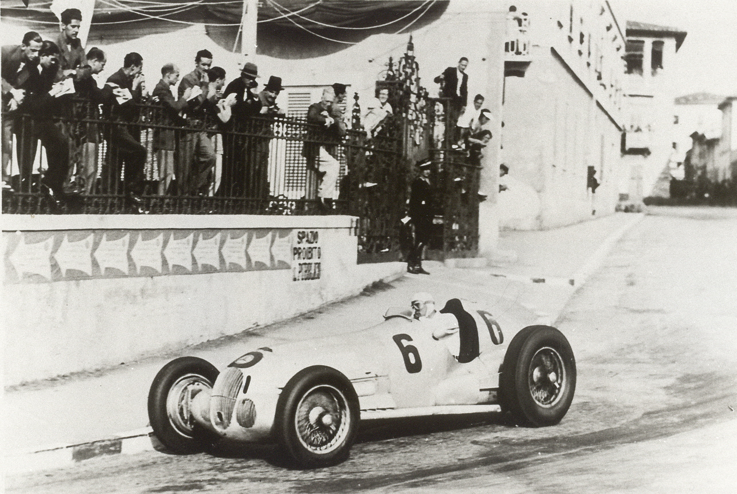 Hermann Lang dans le virage "Antignano" lors du Grand Prix automobile d'Italie 1937 sur le Circuito di Montenero.